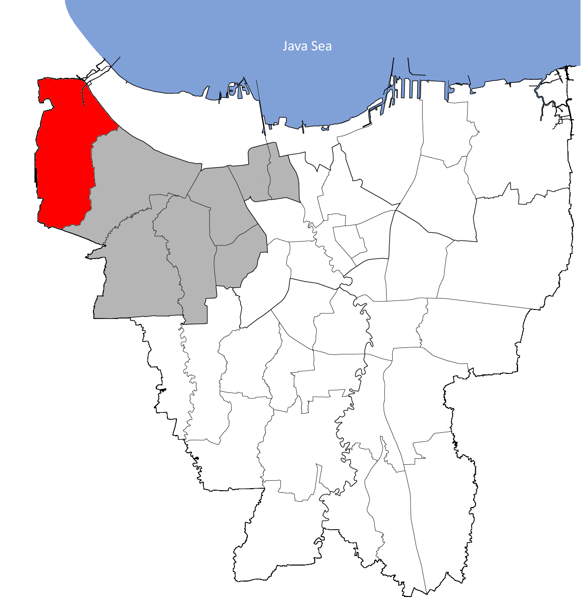 Kalideres;onderdistrict (Kecamatan) van West-Jakarta